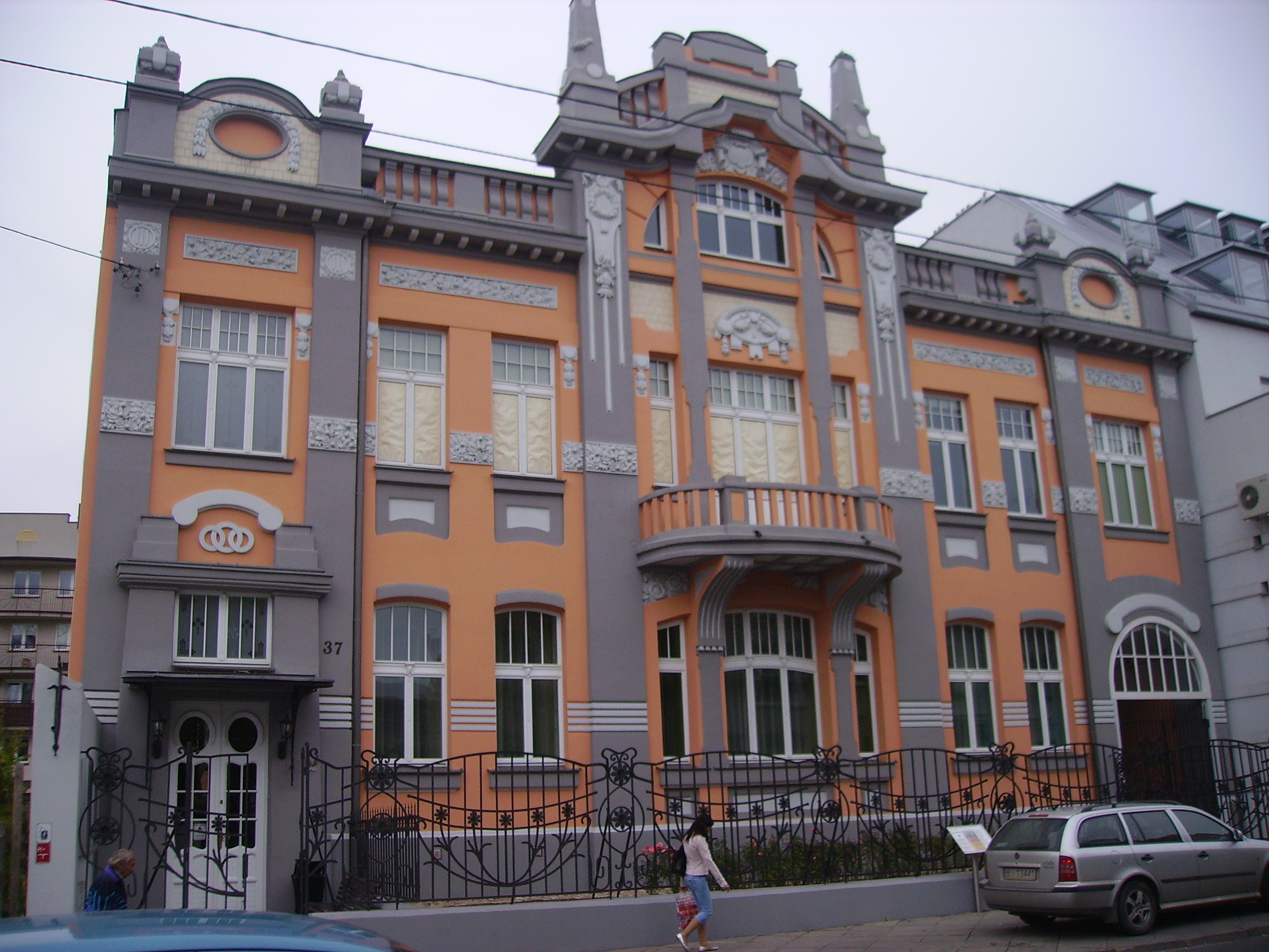 Białystok, ul. Warszawska 37 - "Pałac Citronów" - kamienica i oficyna z ogrodzeniem, obecnie siedziba Muzeum Historycznego (zabytek nr A-164 z 8.04.1978)